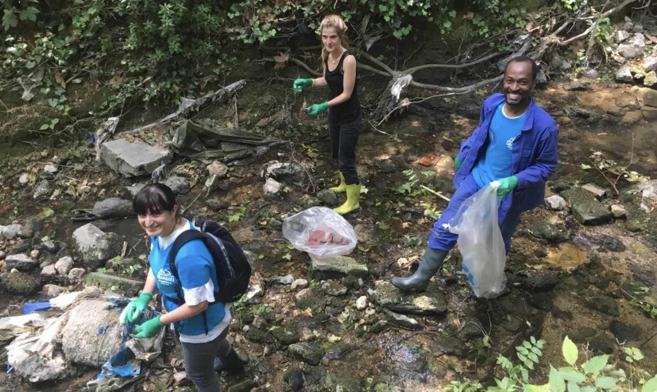 Ils interviennent dans le cadre de l’opération "Calanques propres" organisée sur l’ensemble du littoral marseillais. PHOTO PH.G.